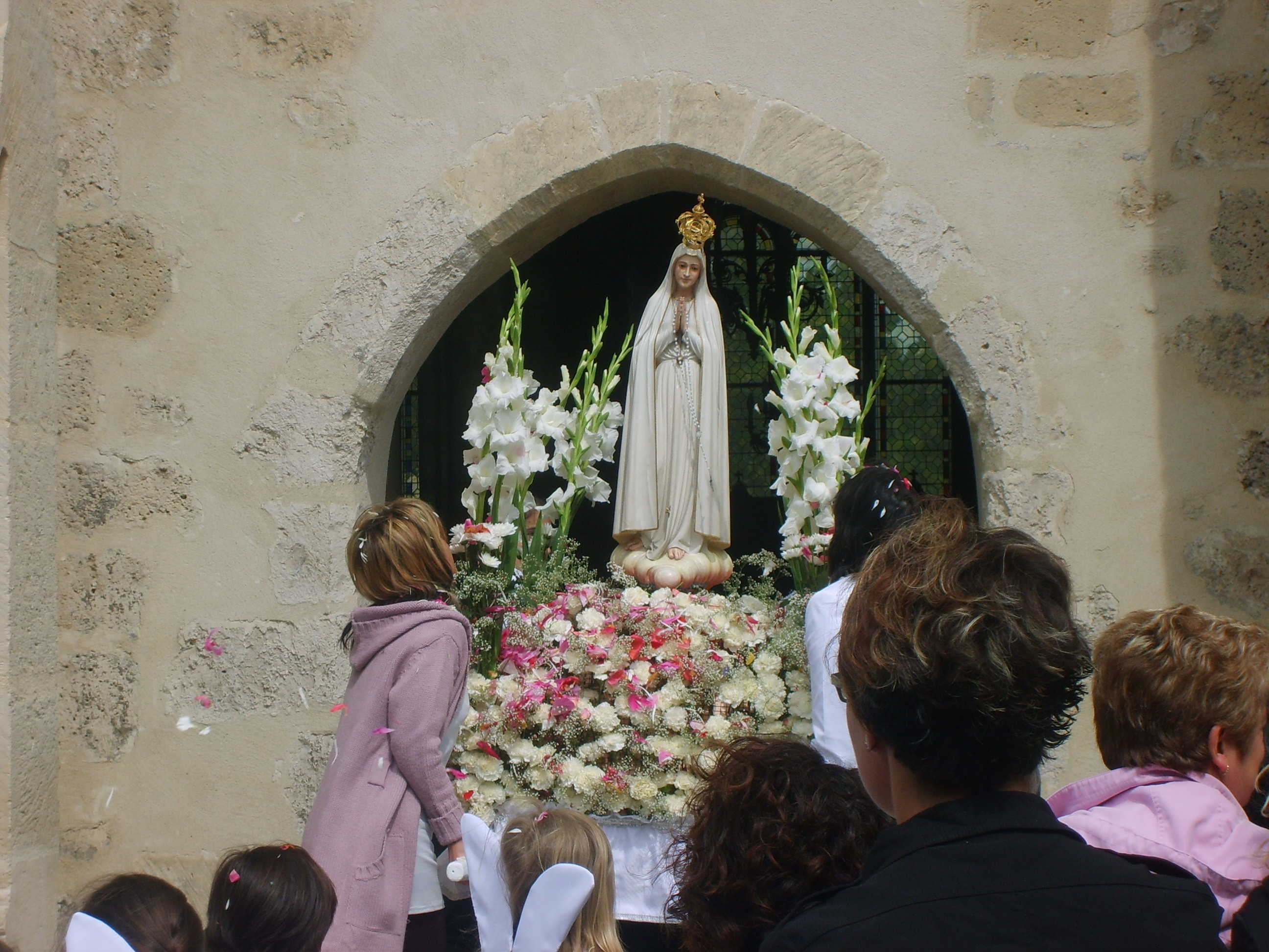 Notre Dame de Fatima à Brie-Comte-Robert 77170